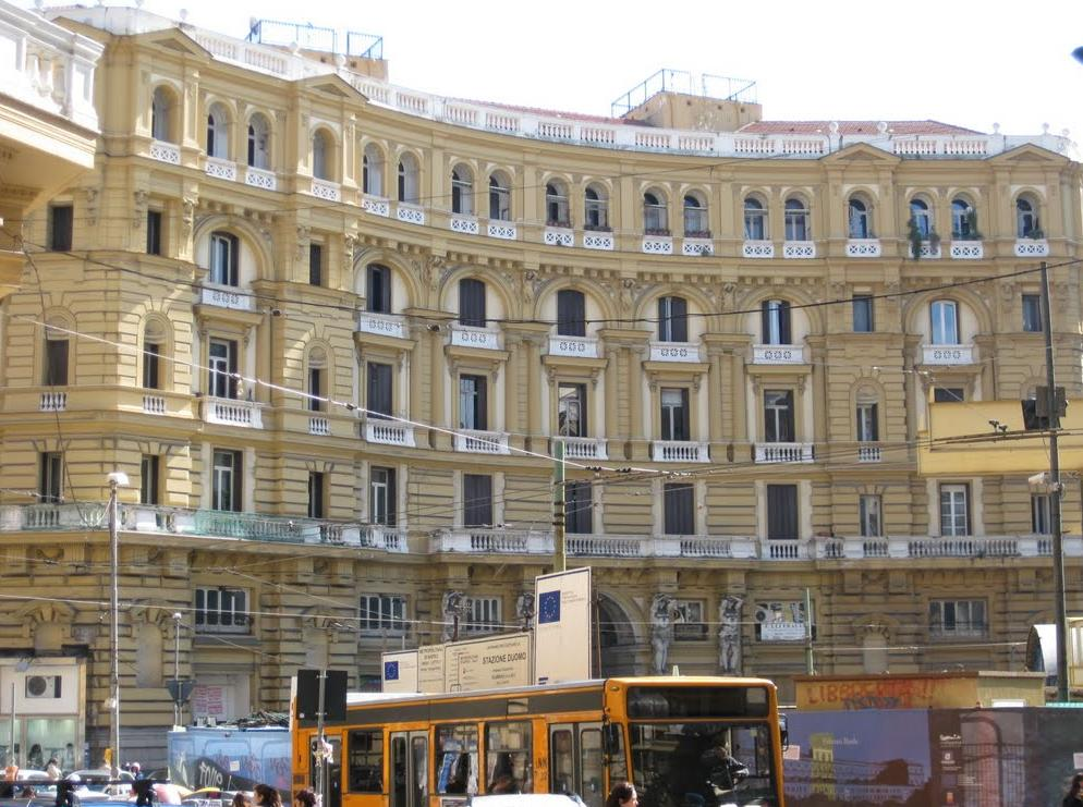 Piazza Nicola Amore (o Piazza 4 Palazzi) di Napoli. Uno dei 4 Palazzi monumentali.